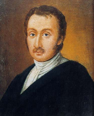 Jan Chalupka A Slovak writer